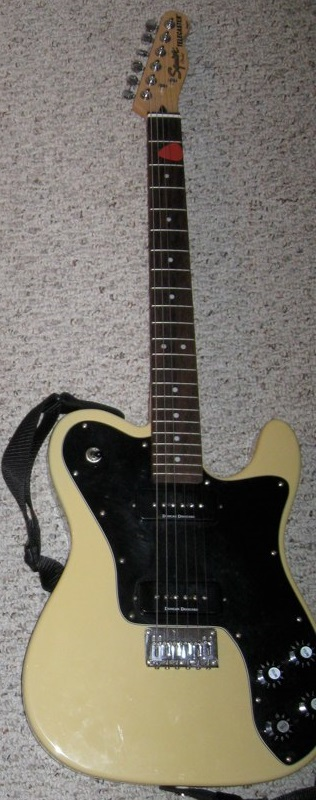 Squier Telecaster Custom